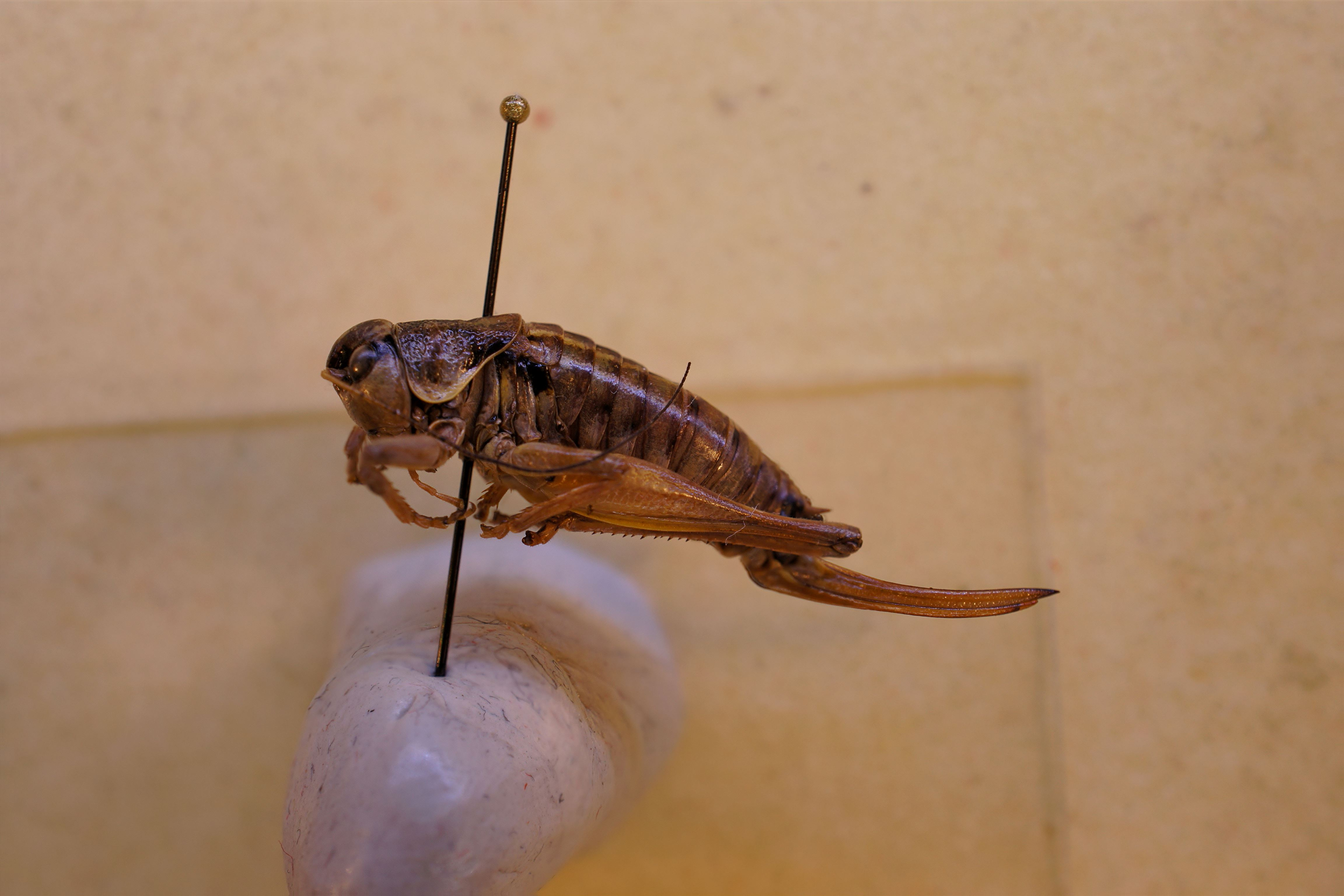 Anonconotus mercantouri Galvagni & Fontana, 2003 (PT): Frankreich, Mont Caval, St. Martin-Vésubie, 24.viii.2003, leg. P. Fontana